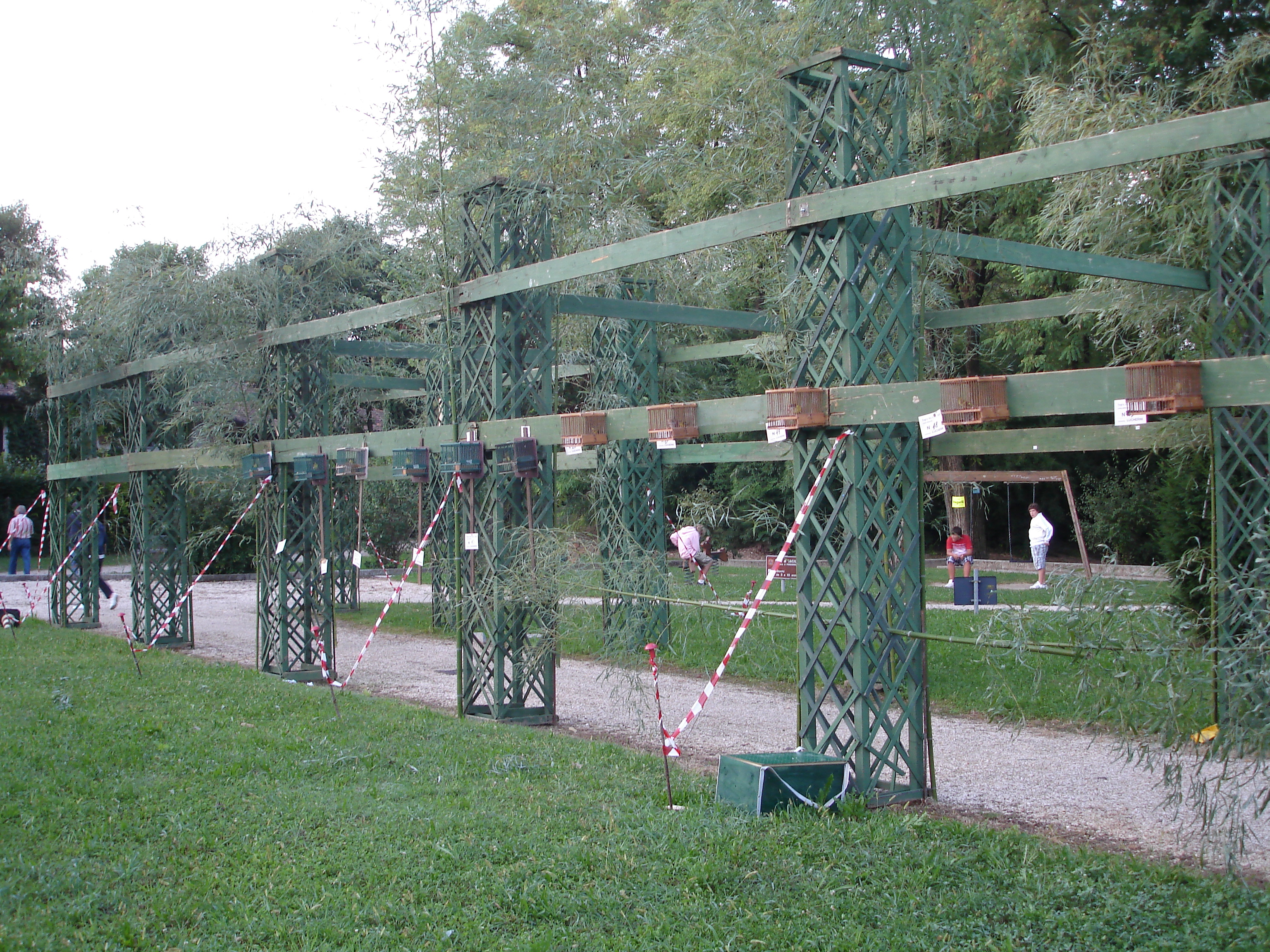 Struttura con gabbiette per l'ascolto dei Lucherini (Carduelis spinus) nell'ambito del concorso canoro della Sagra dei Osei